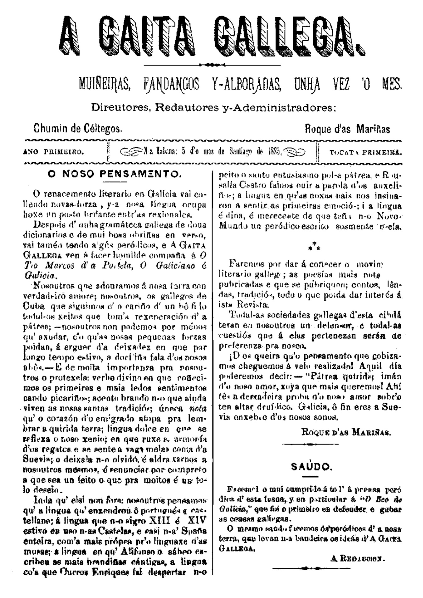 A Gaita Gallega